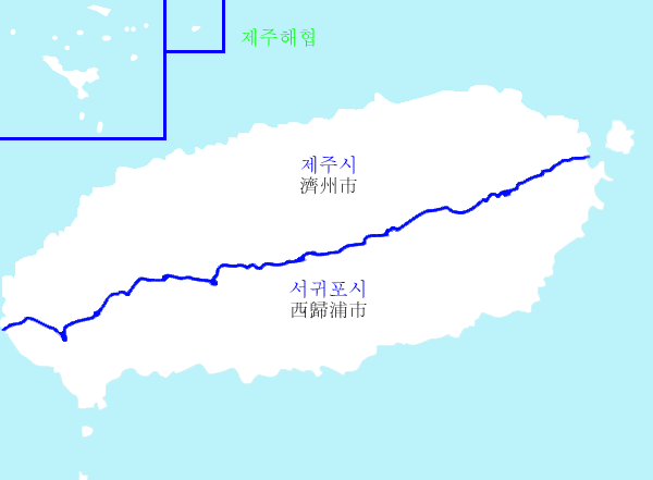 Jeju province